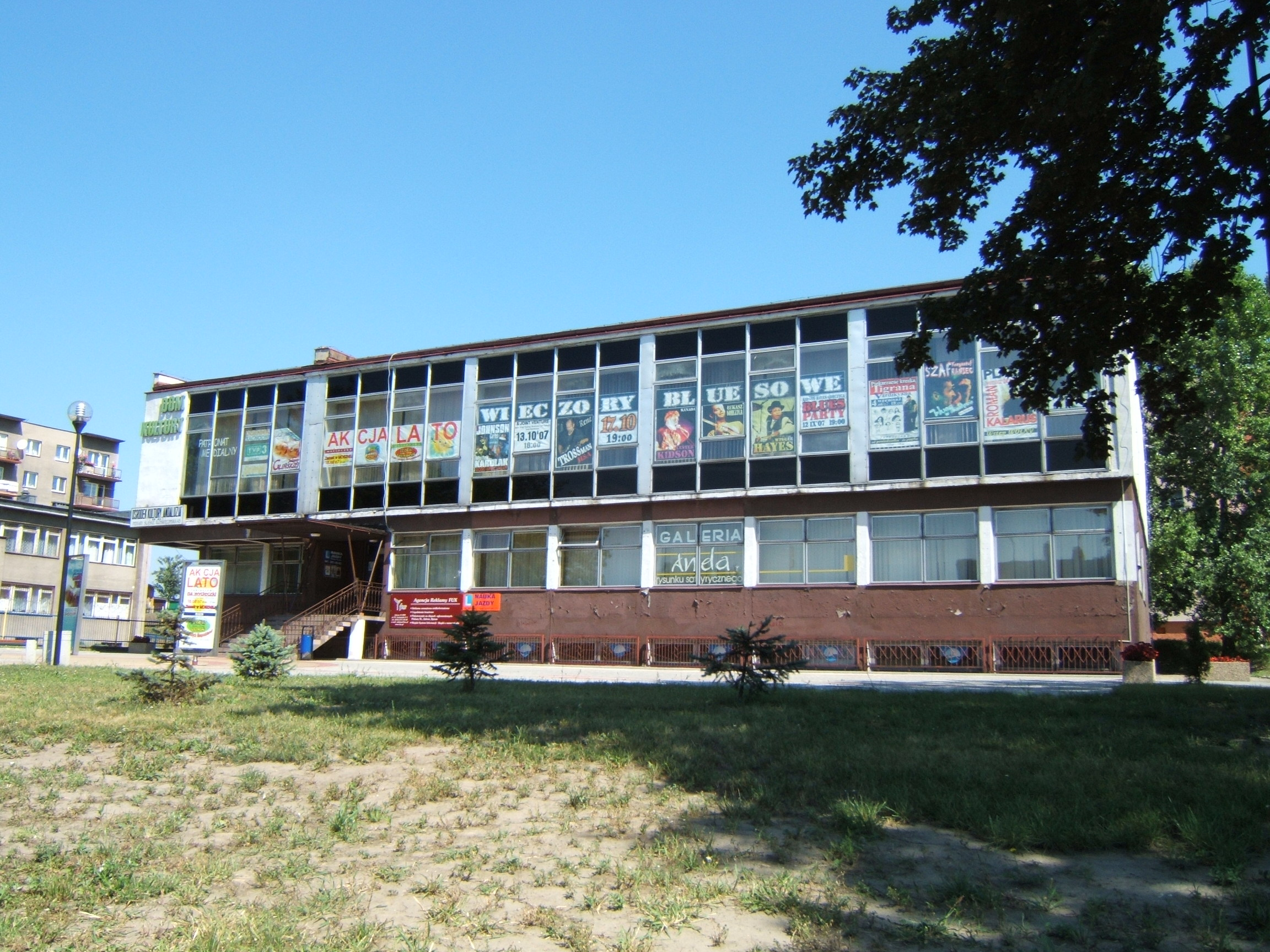 Ośrodek kultury Andaluzja w Piekarach Śląskich, dzielnica Brzozowice-Kamień